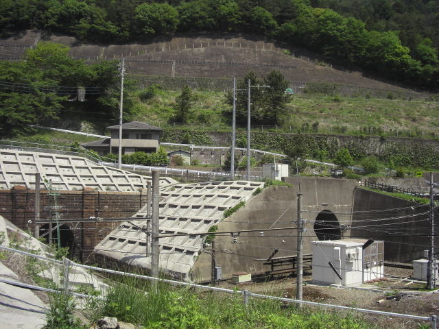 笹子トンネル（手前）と新笹子トンネル（奥）